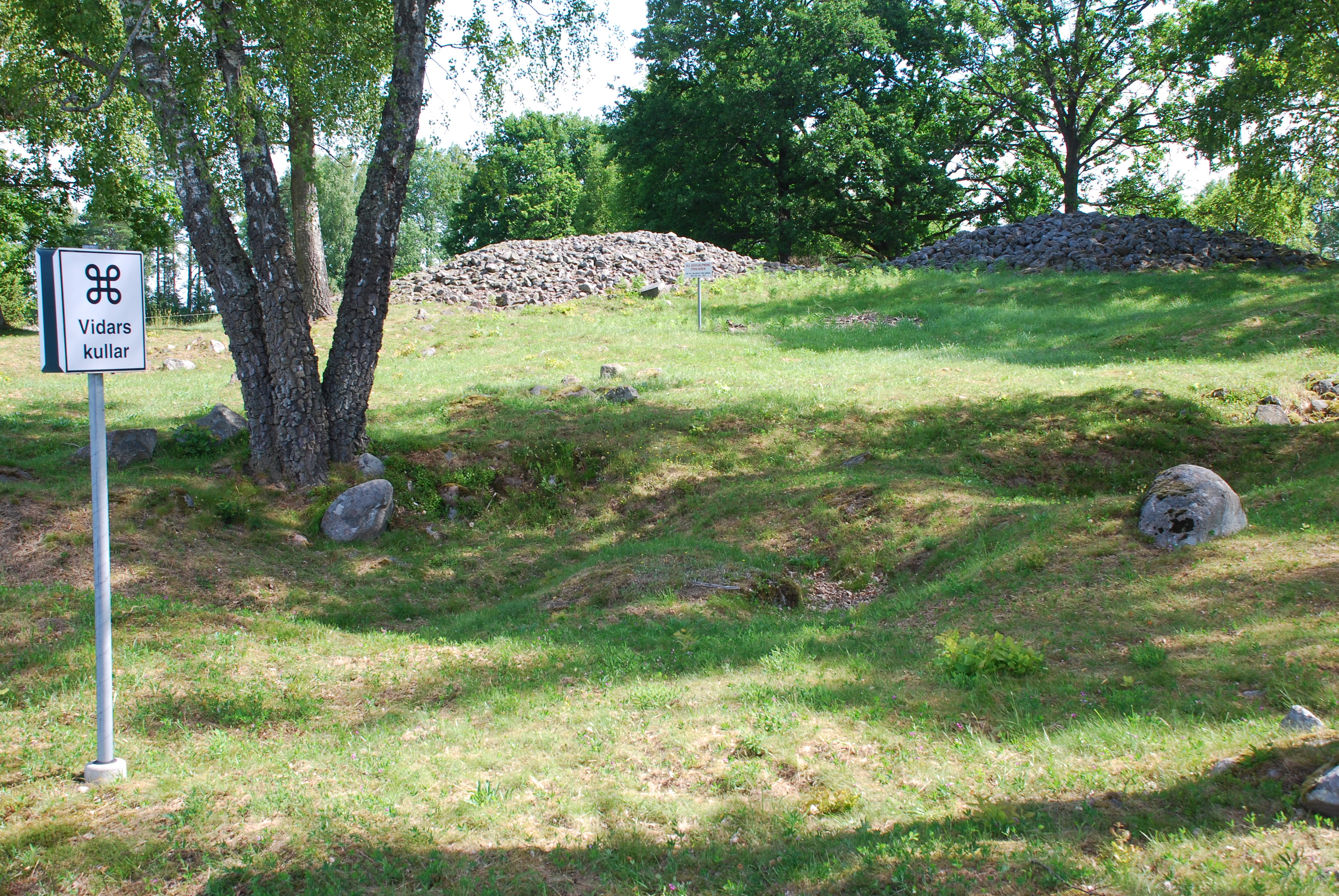 Vidars kullar nära Vederslöv